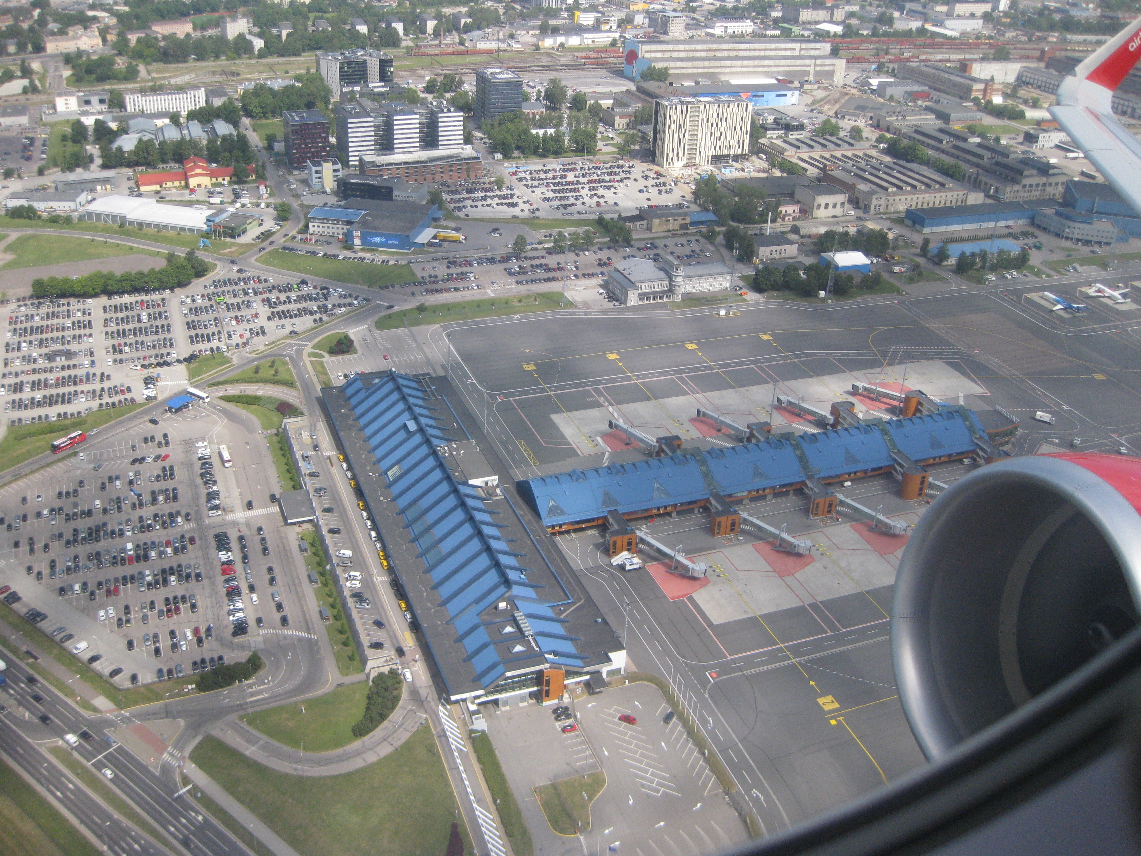 IATA Code TLL